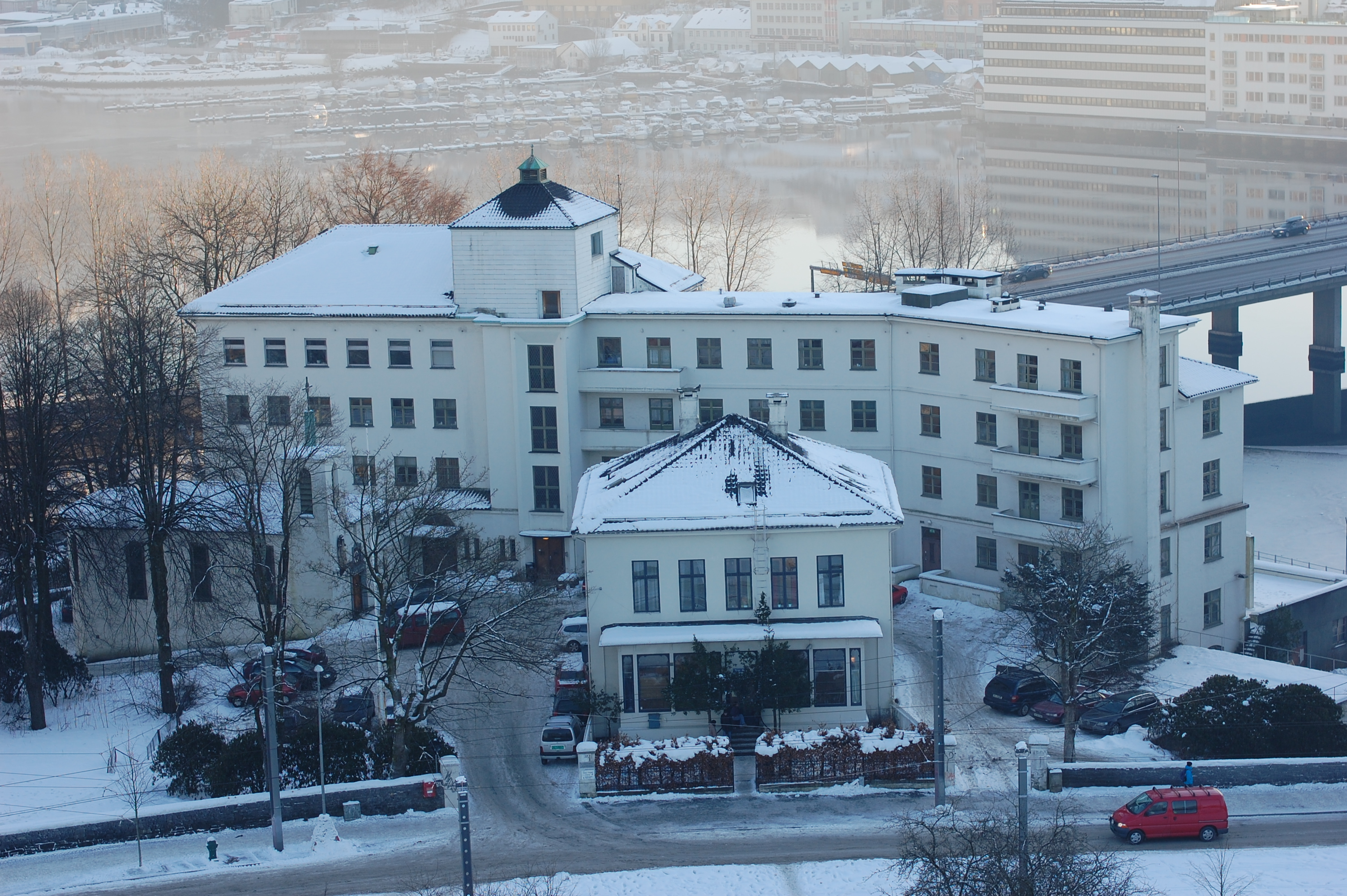 Sykehuset Florida sett mot sørøst. Store Lungegårdsvann sees i bakgrunnen.